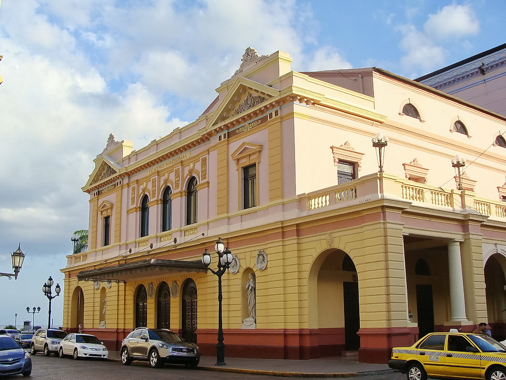 Teatro Nacional de Panamá